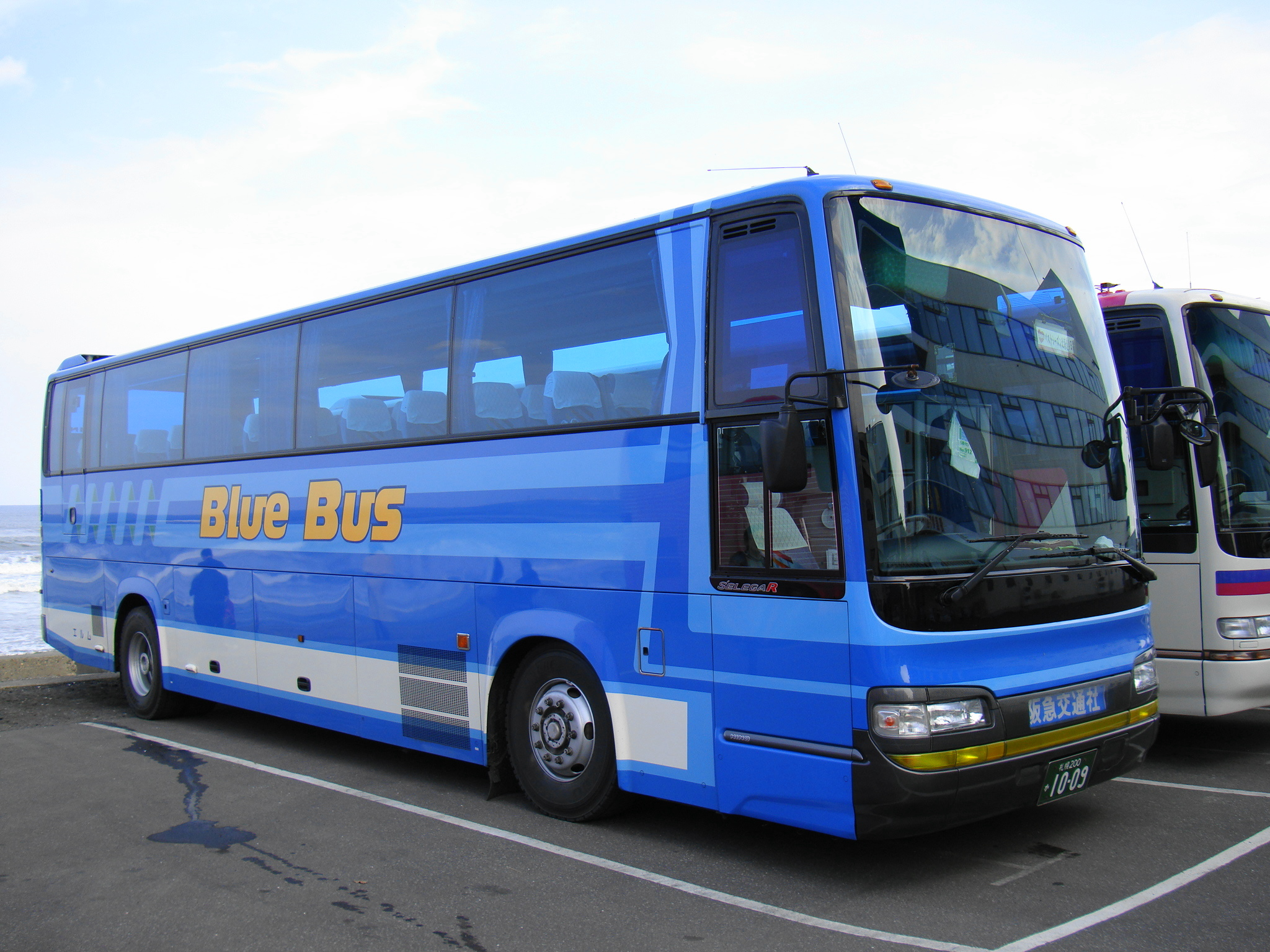 Blue Bus